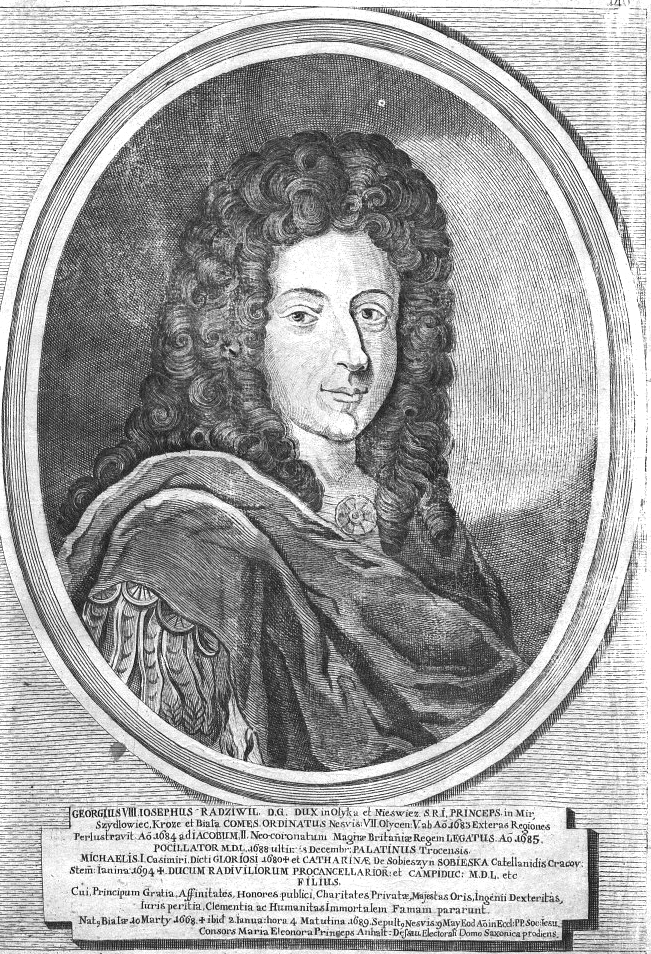 Jerzy Józef Radziwiłł